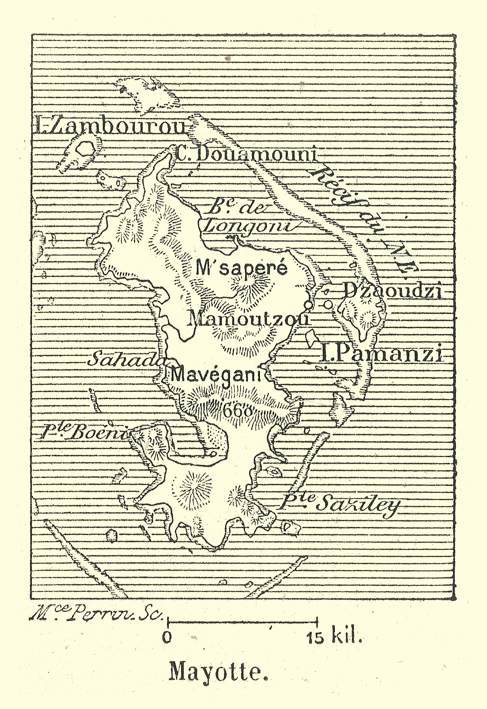 Carte de Franz Schrader